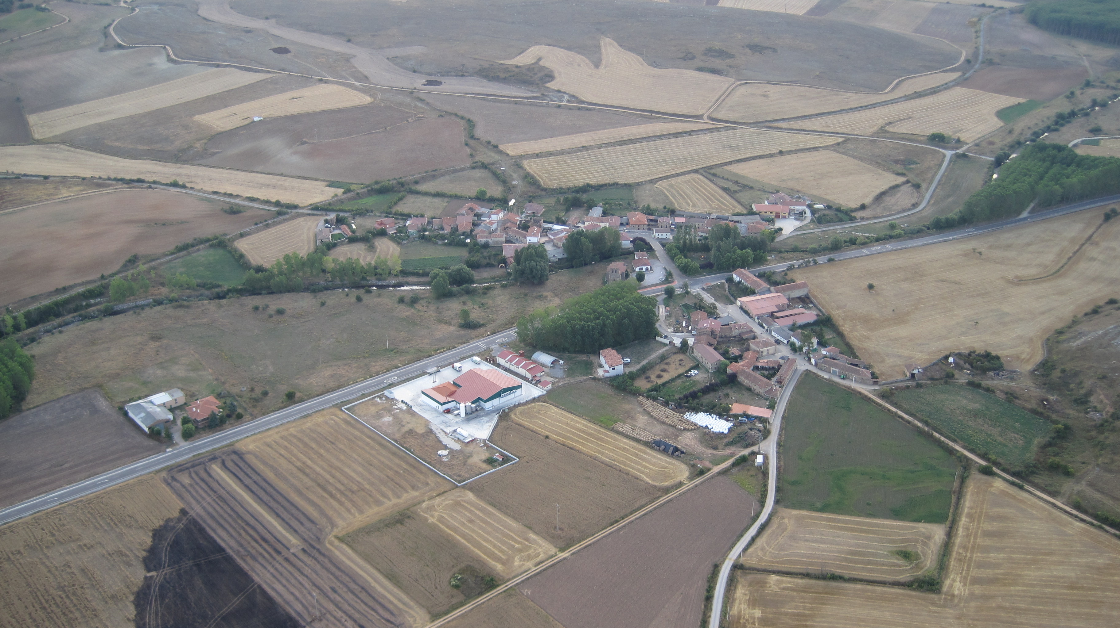 Vista aérea de Nestar (Aguilar de Campoo, Palencia, España)